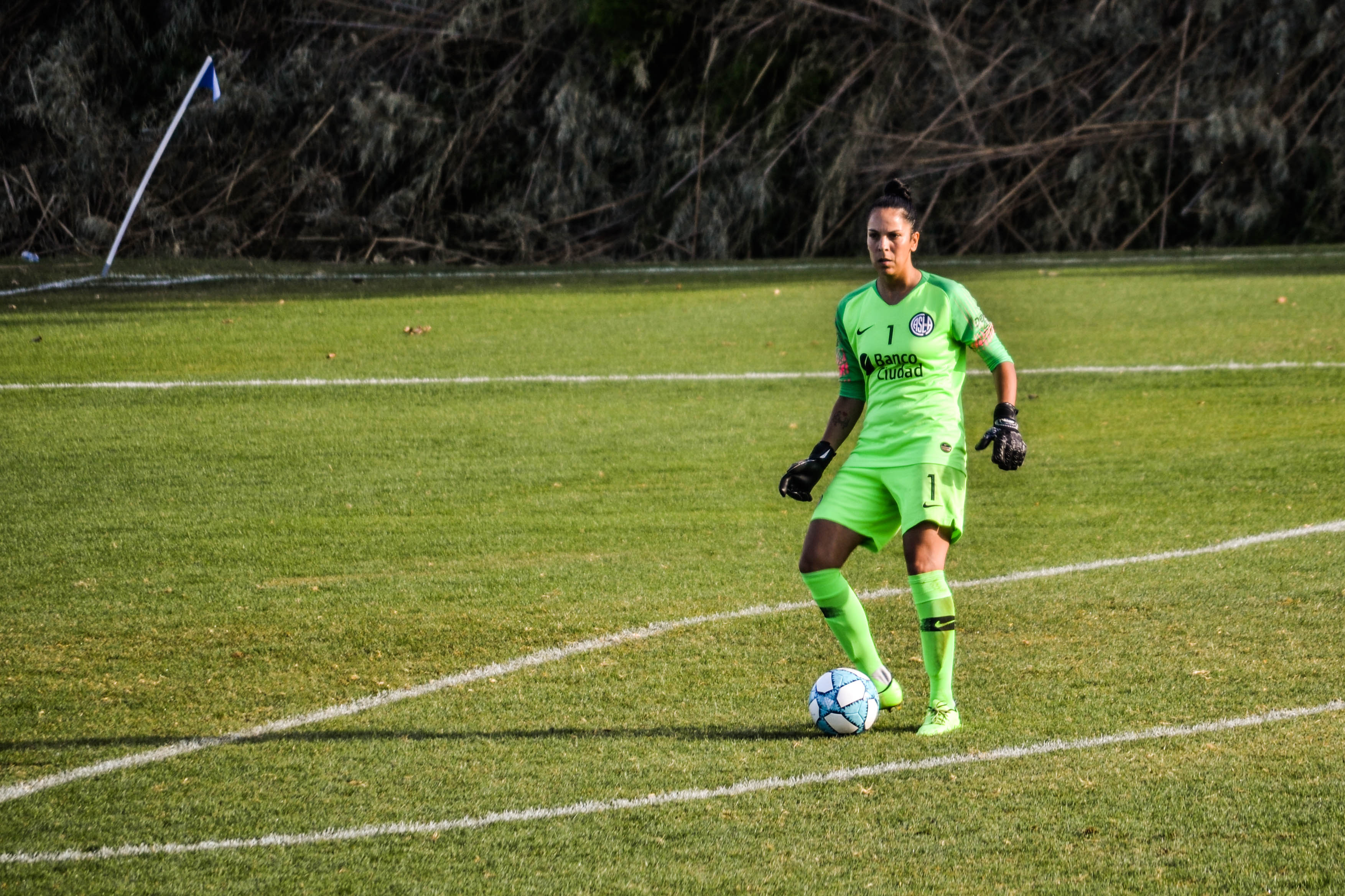 San lorenzo rosario central futbol femenino